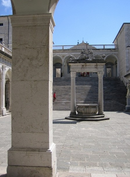 Abtei Monte Cassino, Kreuzgang des Bramante